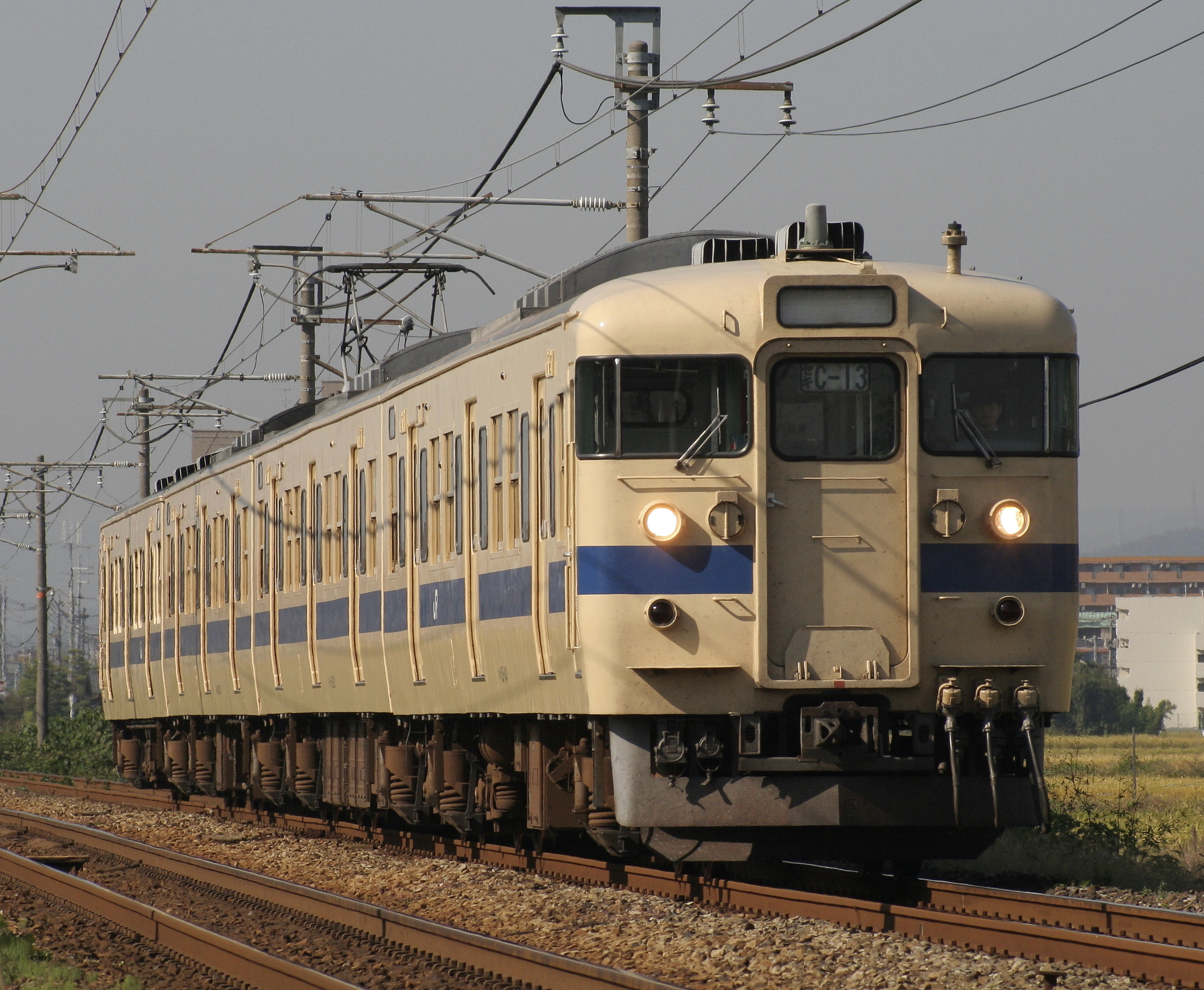 JR西日本115系電車C13編成、瀬戸内色。山陽本線、中庄 - 庭瀬間。